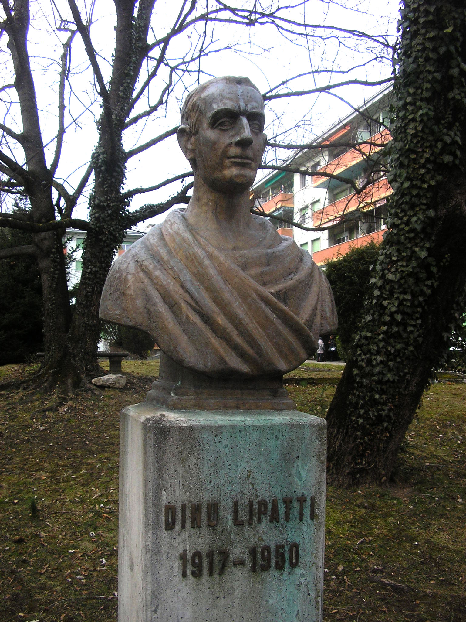 Buste de Dinu Lipatti (1917-1950) dans le parc qui porte son nom à Chêne-Bourg, canton de Genève